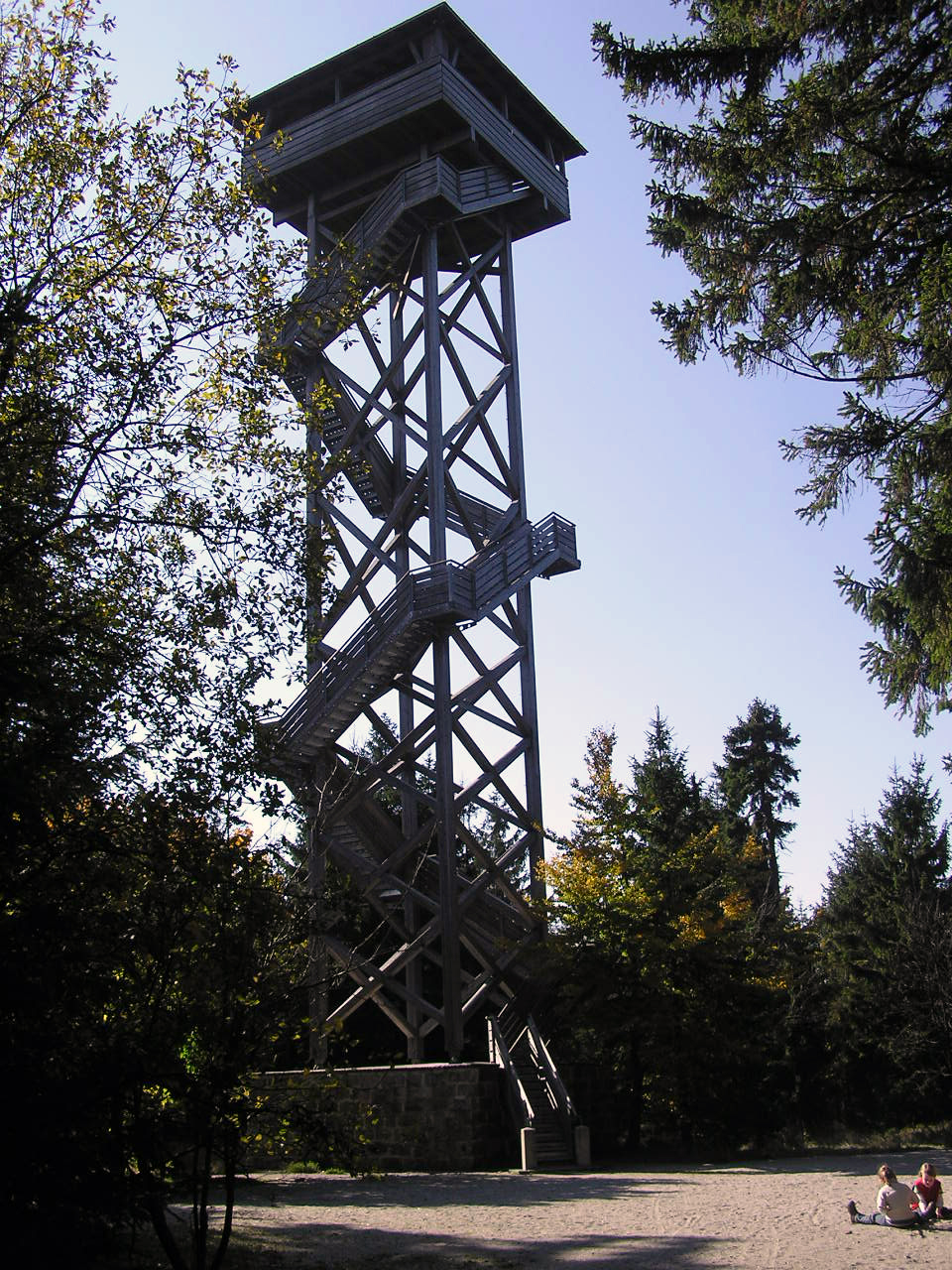 Description: Oberpfalzturm im Steinwald Source: selbst fotografiert Date: 11. Oktober 2005 Author: Schubbay